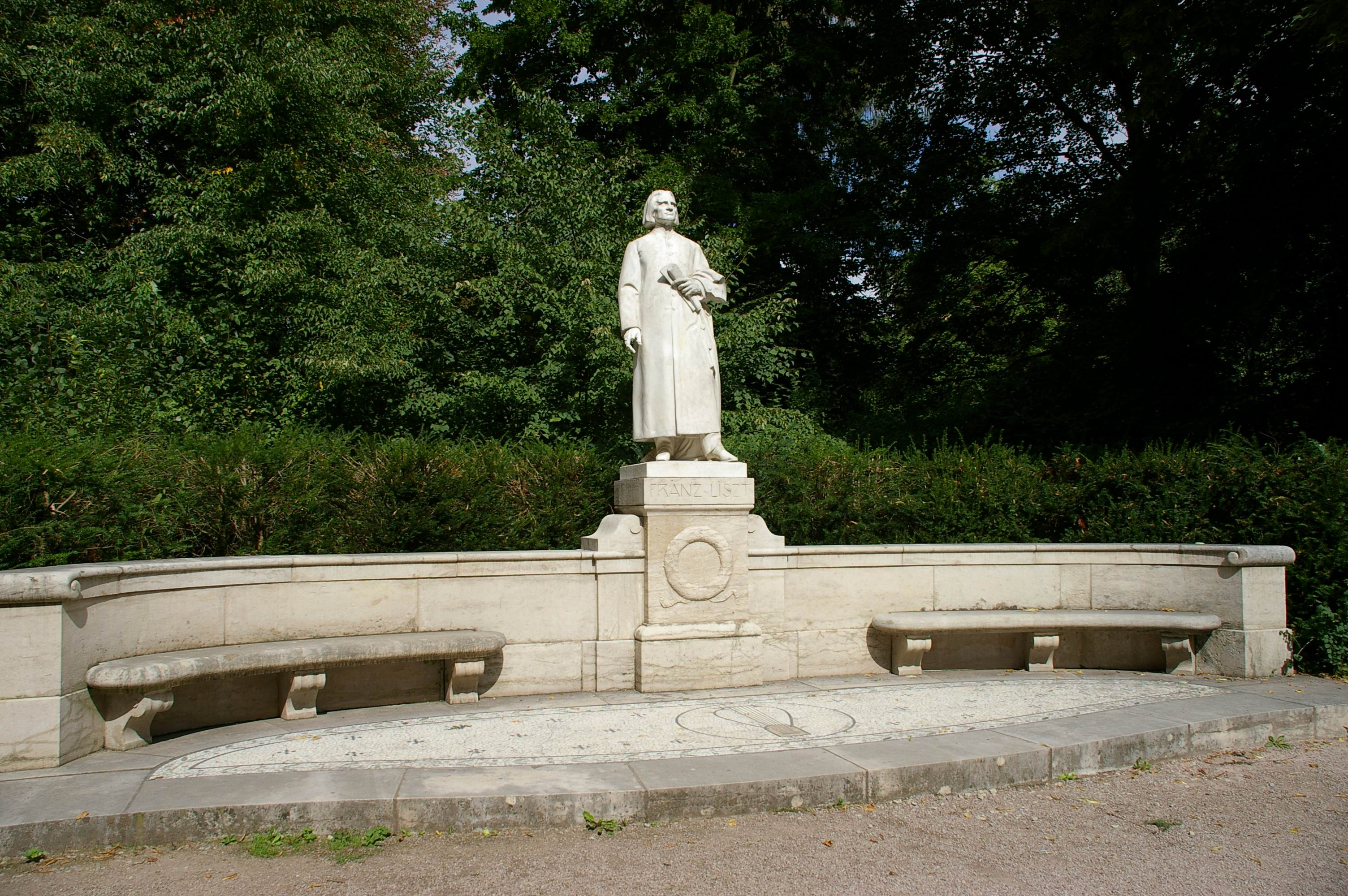 Liszt-Denkmal am Liszt-Haus in Weimar